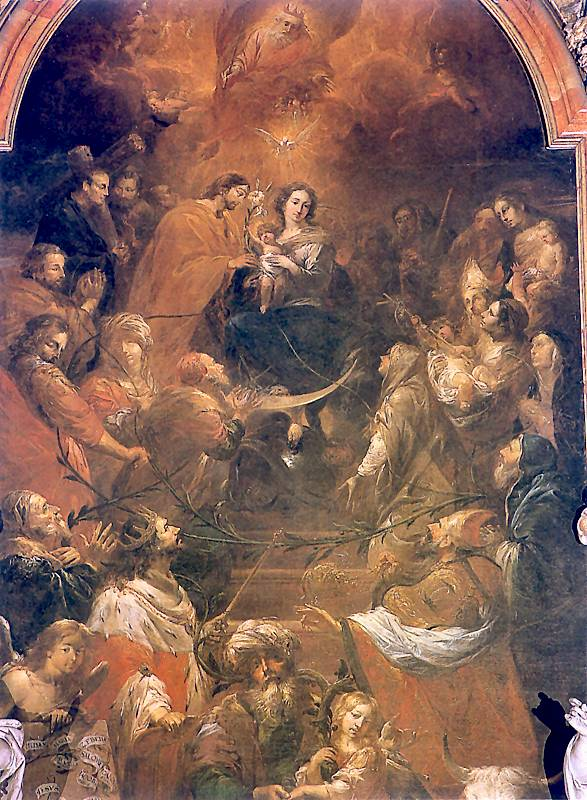 Michael Willmann